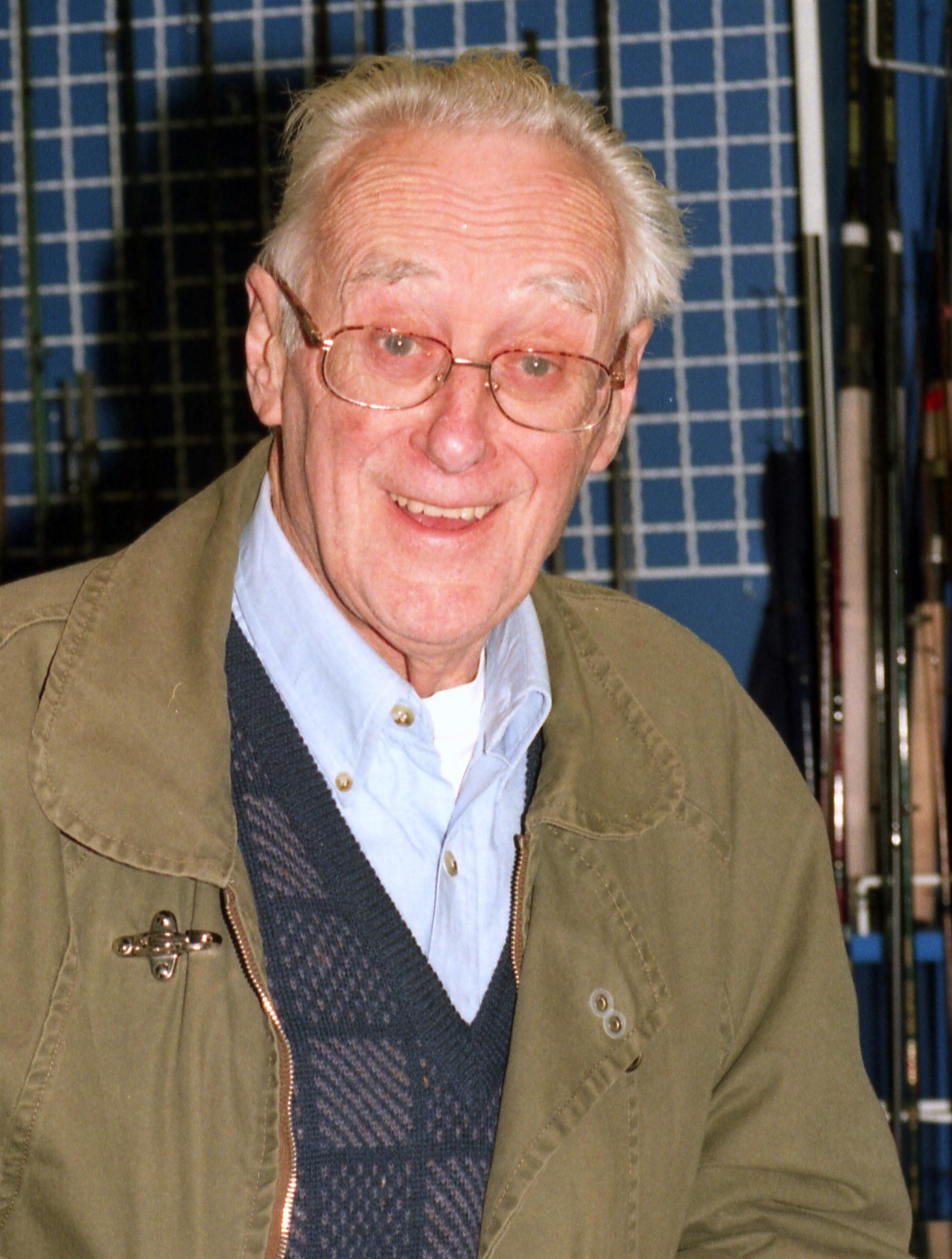 Jarema Stępowski, aktor i piosenkarz.